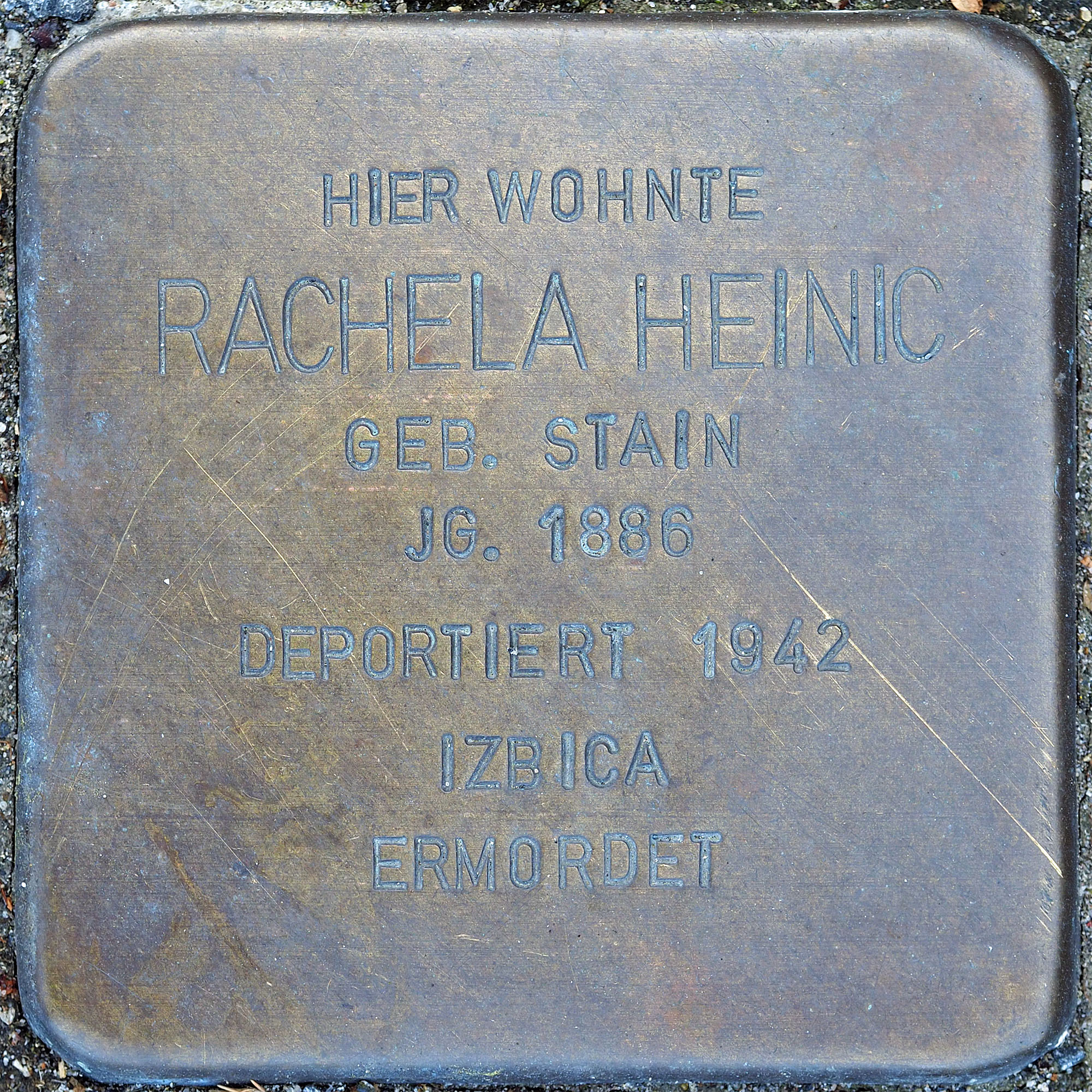 Stolpersteine MG: Heinic, Rachela